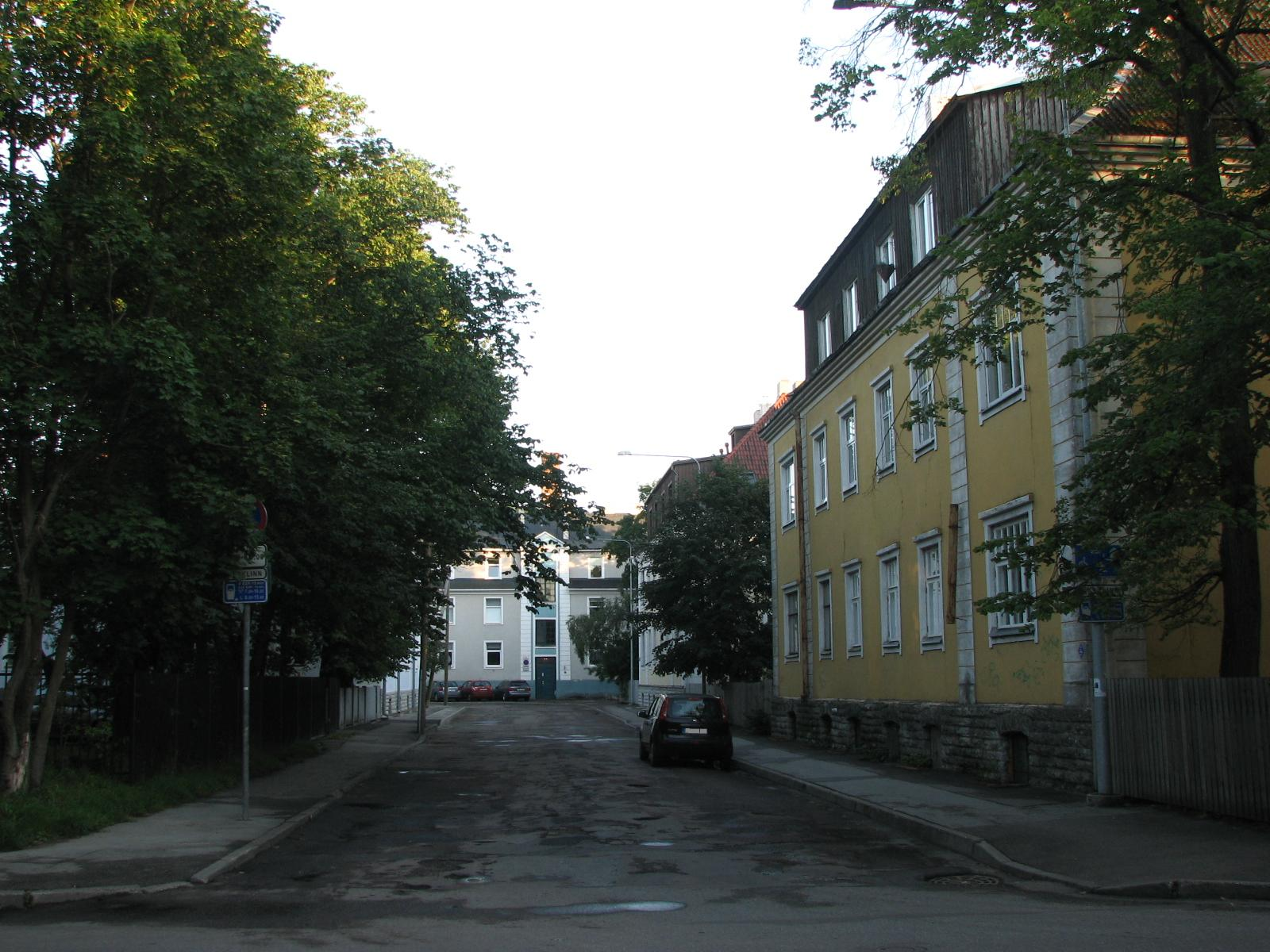 Vaade Õpetajate tänavale Herne tänavalt